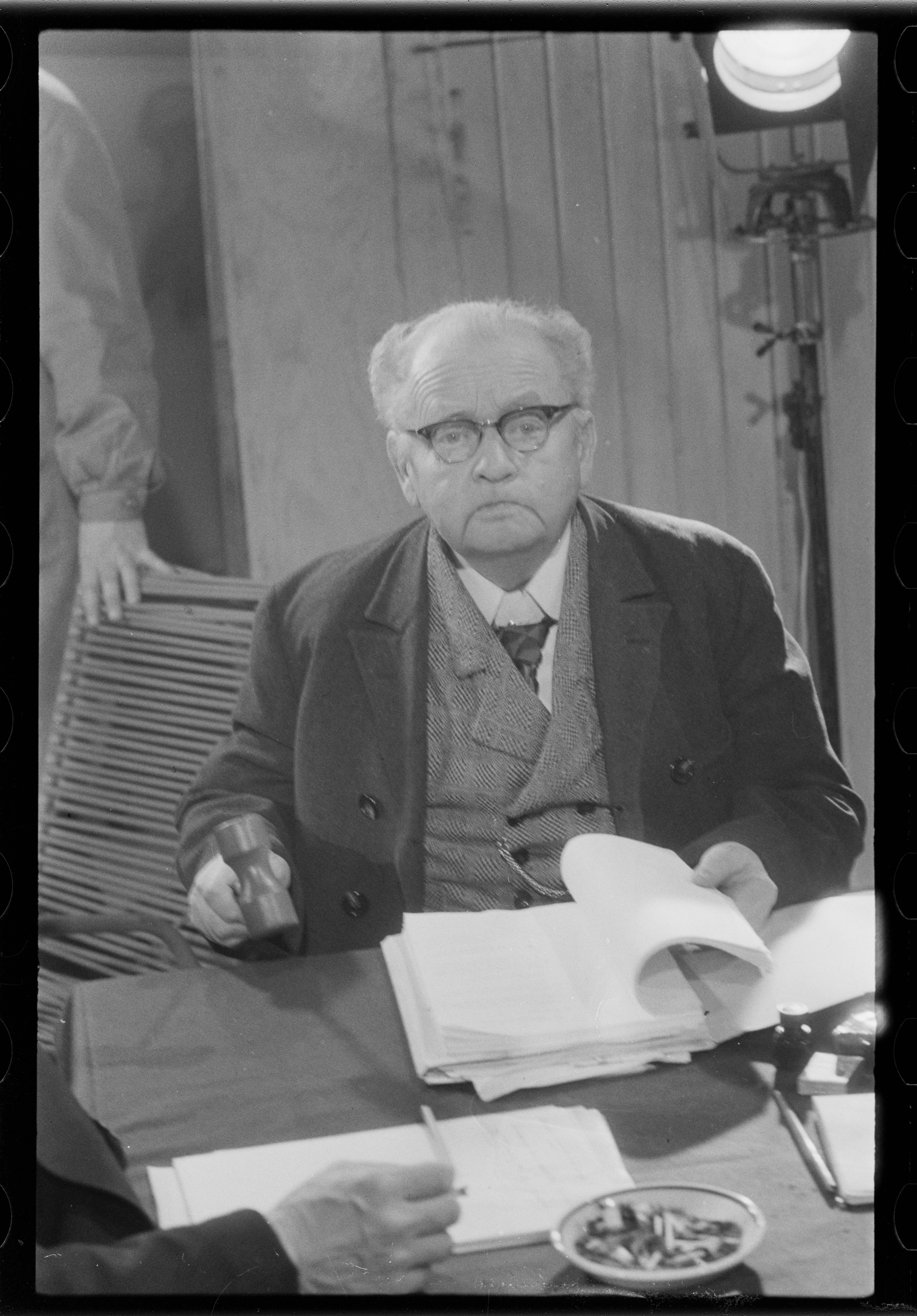 Bildet er hentet fra Arkivverket. Foto tatt i forbindelse med reportasje om den norske filmen Freske fraspark fra 1963. Manus var ved Kjell Aukrust og Bjørn Breigutu. Regi ved Bjørn Breigutu. Kjell Aukrust, Leif Juster, Turid Caldwell, Alfhild Hovdan, Per Bistrup, Lalla Carlsen Arkivinstitusjon : Riksarkivet Arkivnavn : Billedbladet NÅ Sted : Norge, Ukjent, Ukjent, Ukjent Emneord: Menn, Filminnspilling Avbildet: Ukjent